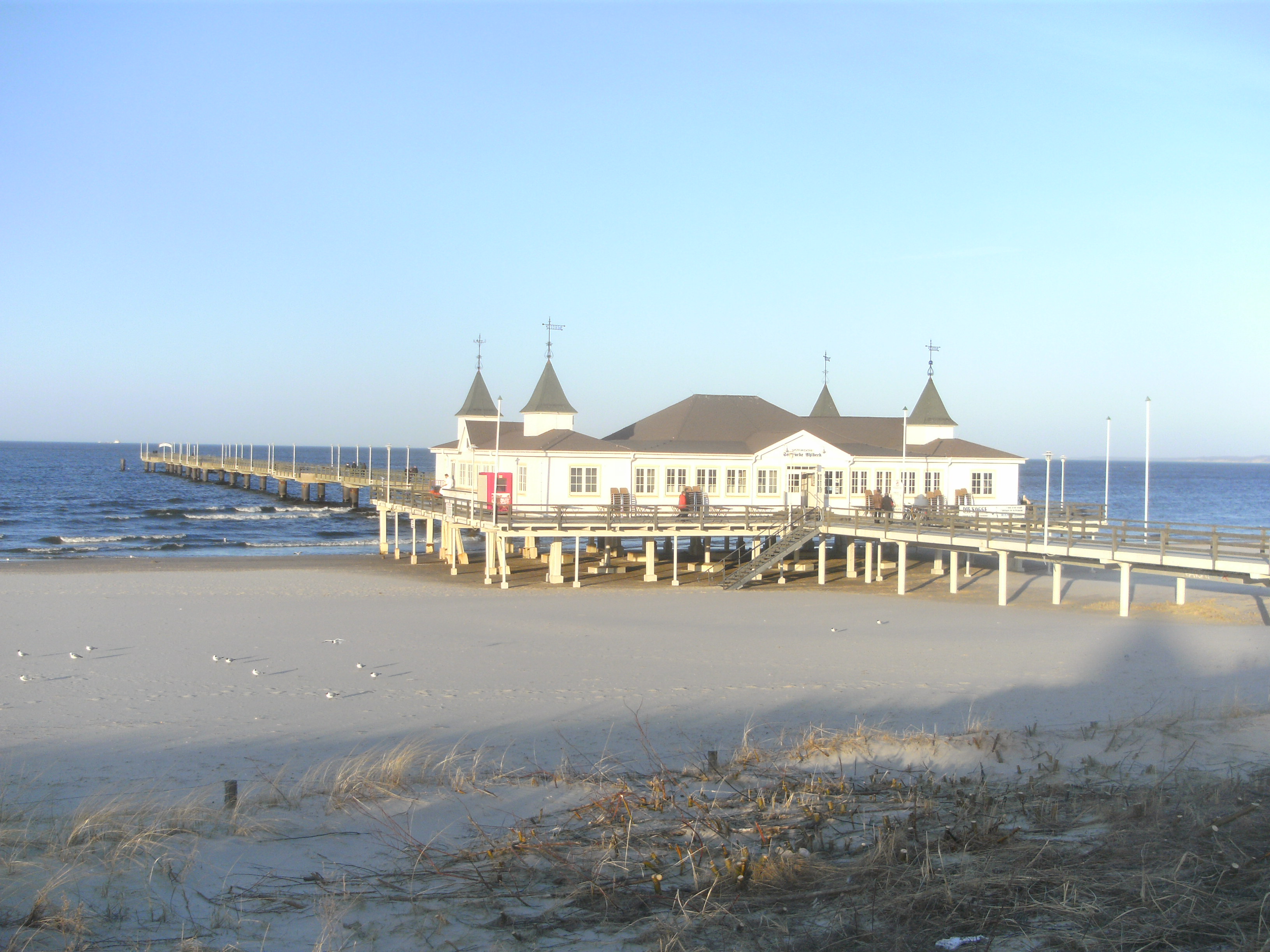 Bad Ahlbeck (Usedom). Seesteg mit dem historischen Restaurant "Seebrücke Ahlbeck".